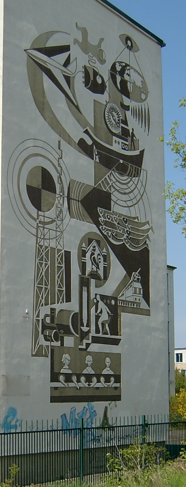 Wandgemälde Halbleiterlemente in Frankfurt (Oder). Geschaffen von Rudolf Grunemann.